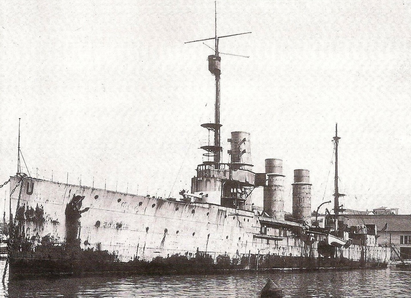 L’incrociatore leggero Bari a Taranto.